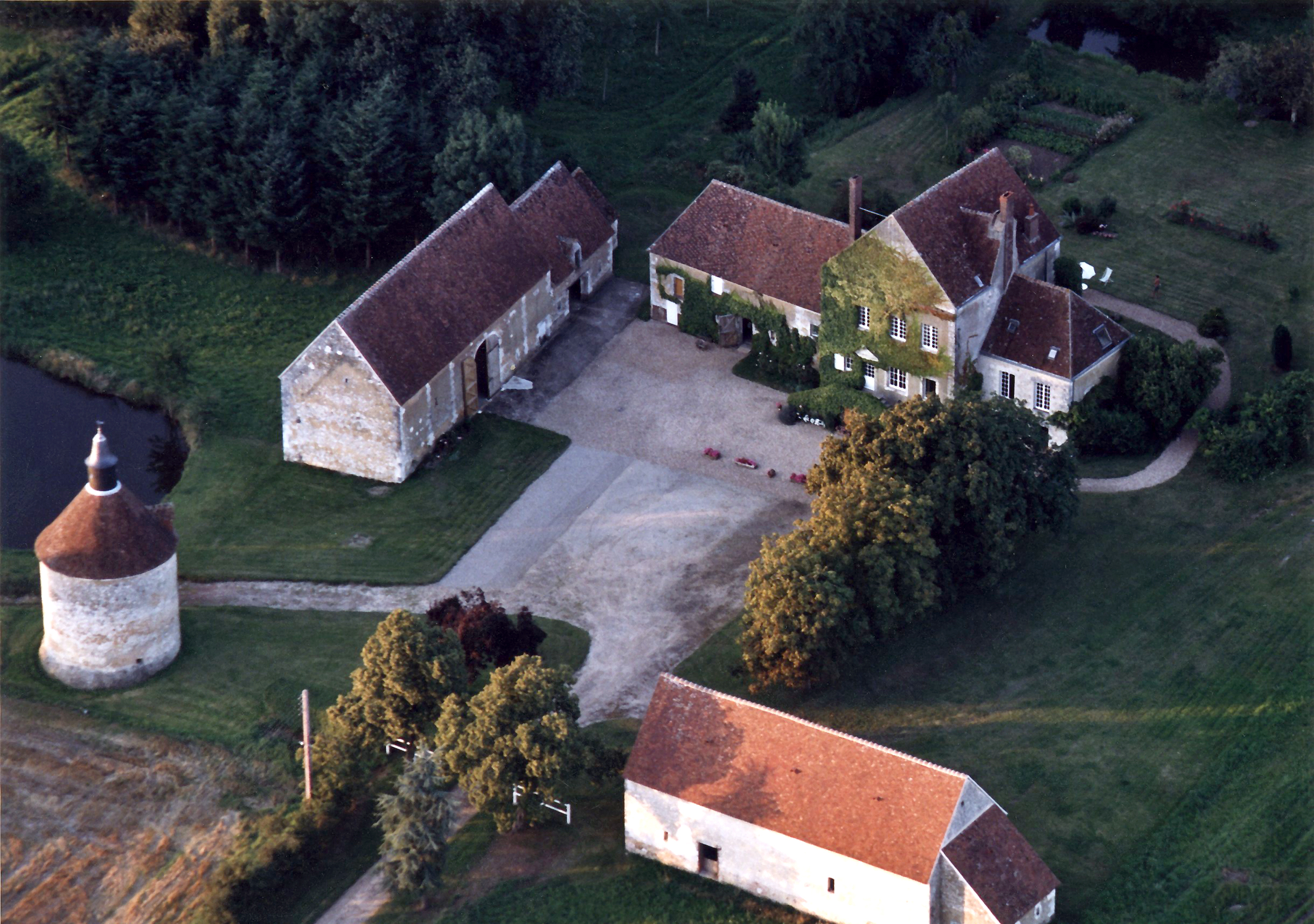 Manoir des Touches